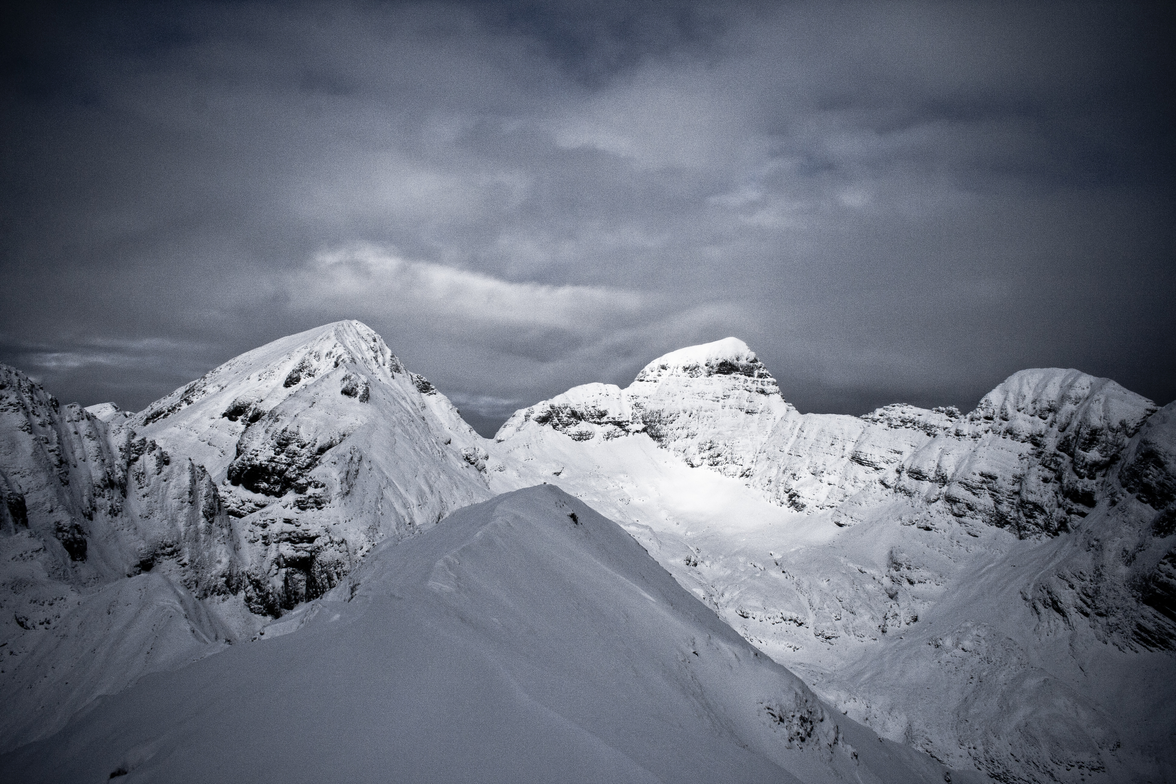 Vista dalla cima del m. Tremol, gruppo del Cavallo